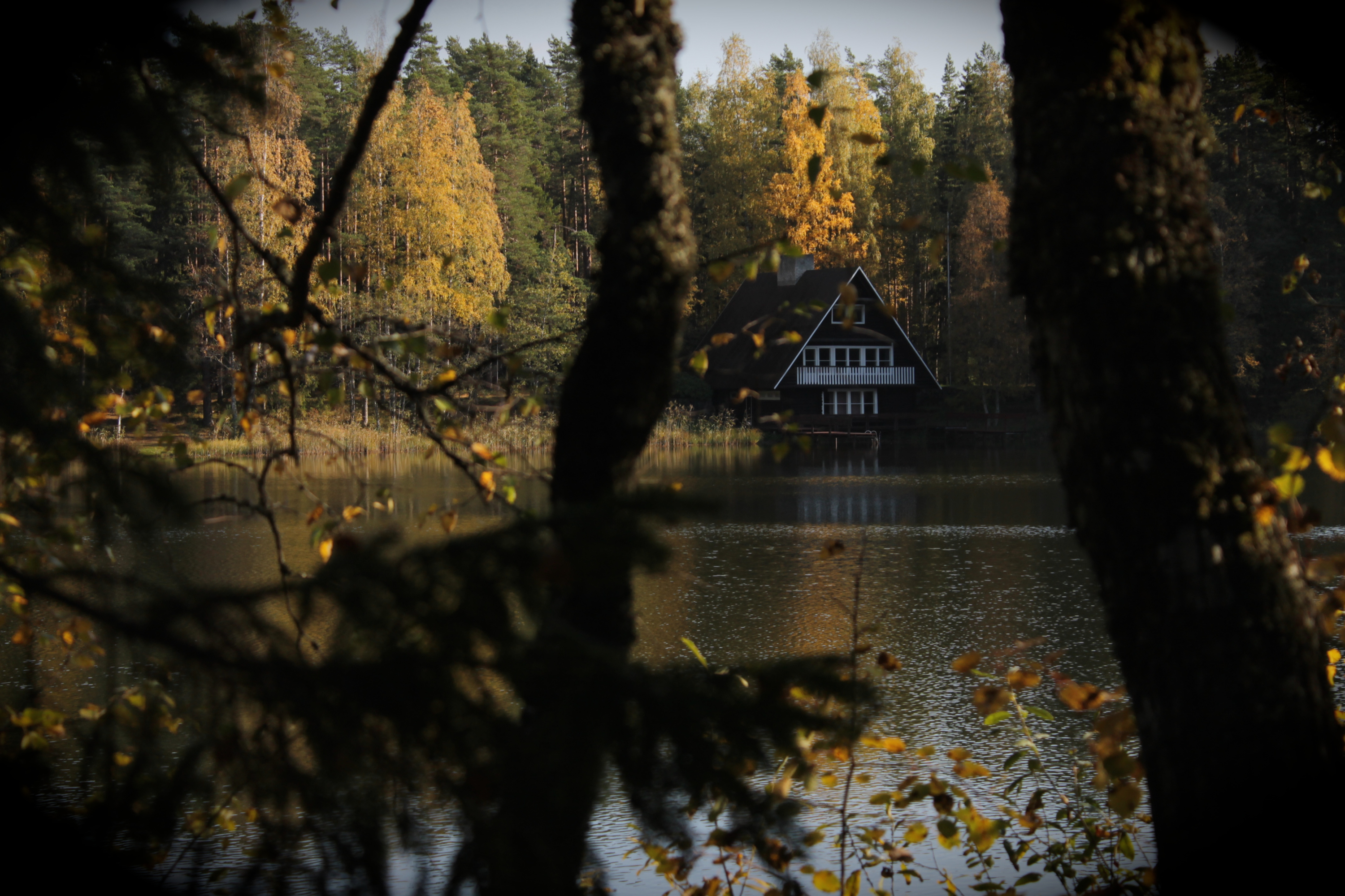 Viitna Linajärv